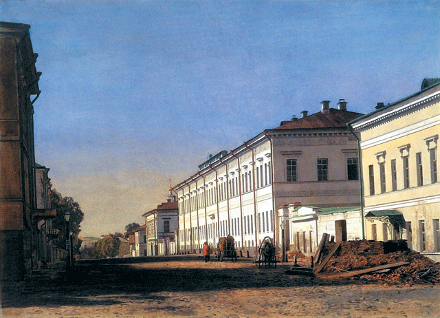 Александровский дворянский институт. Нижний Новгород